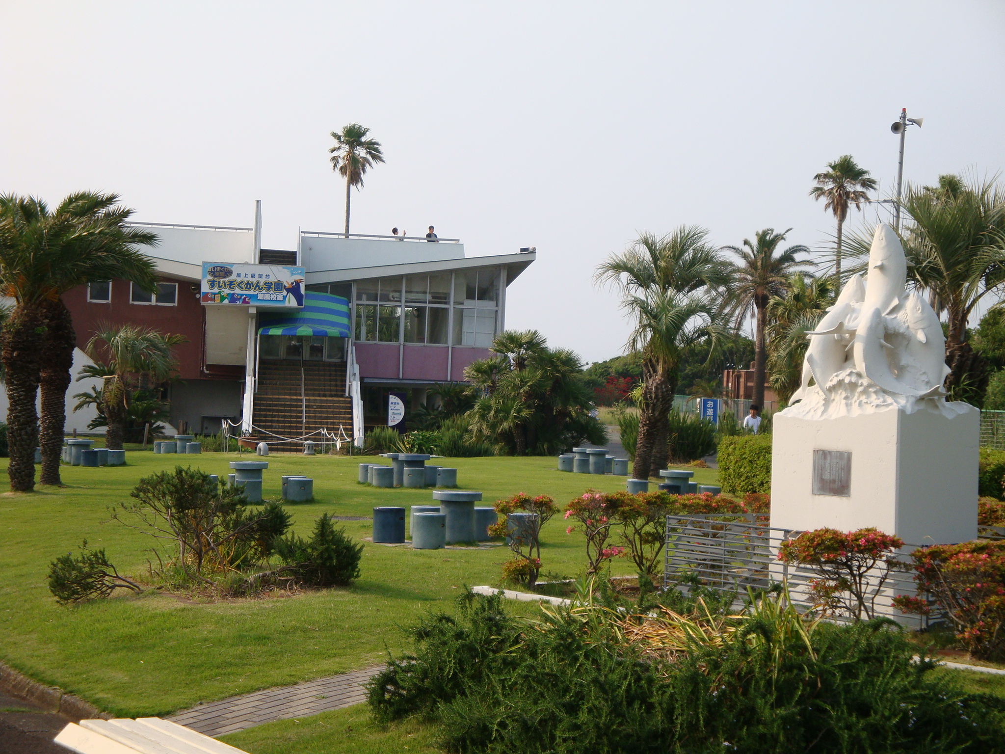 京急油壺マリンパーク海岸側広場。